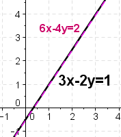 Линеарна функција стандарден облик